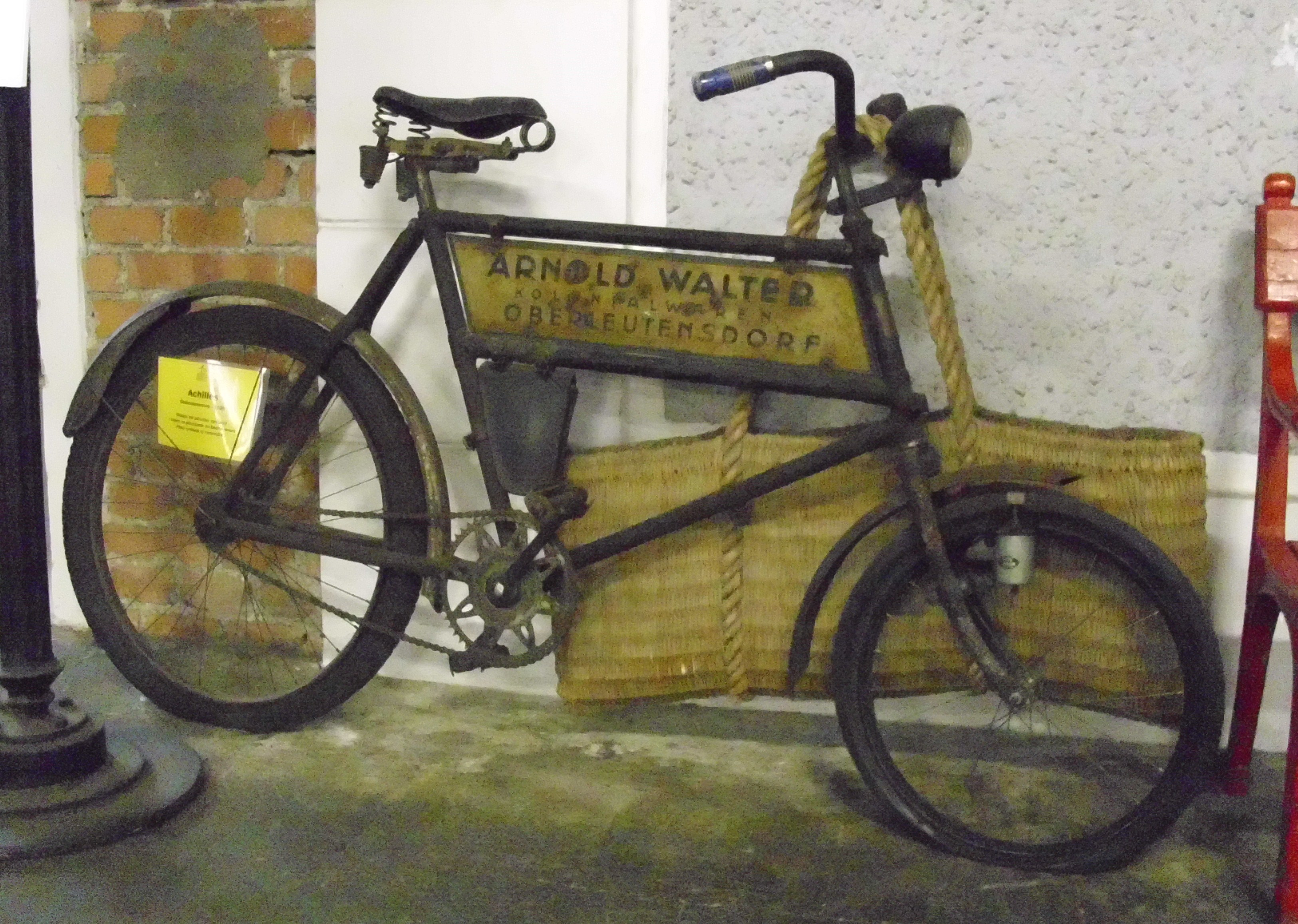 Achilles Fahrrad von Achilles Fahrrad- und Motorfahrzeugfabrik aus den 1920er Jahren im Transportmuseum von Bratislava.